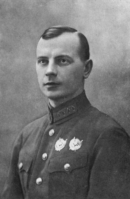 Алексей Селявкин (1896 - 1981), один из основатель советских бронетанковых частей